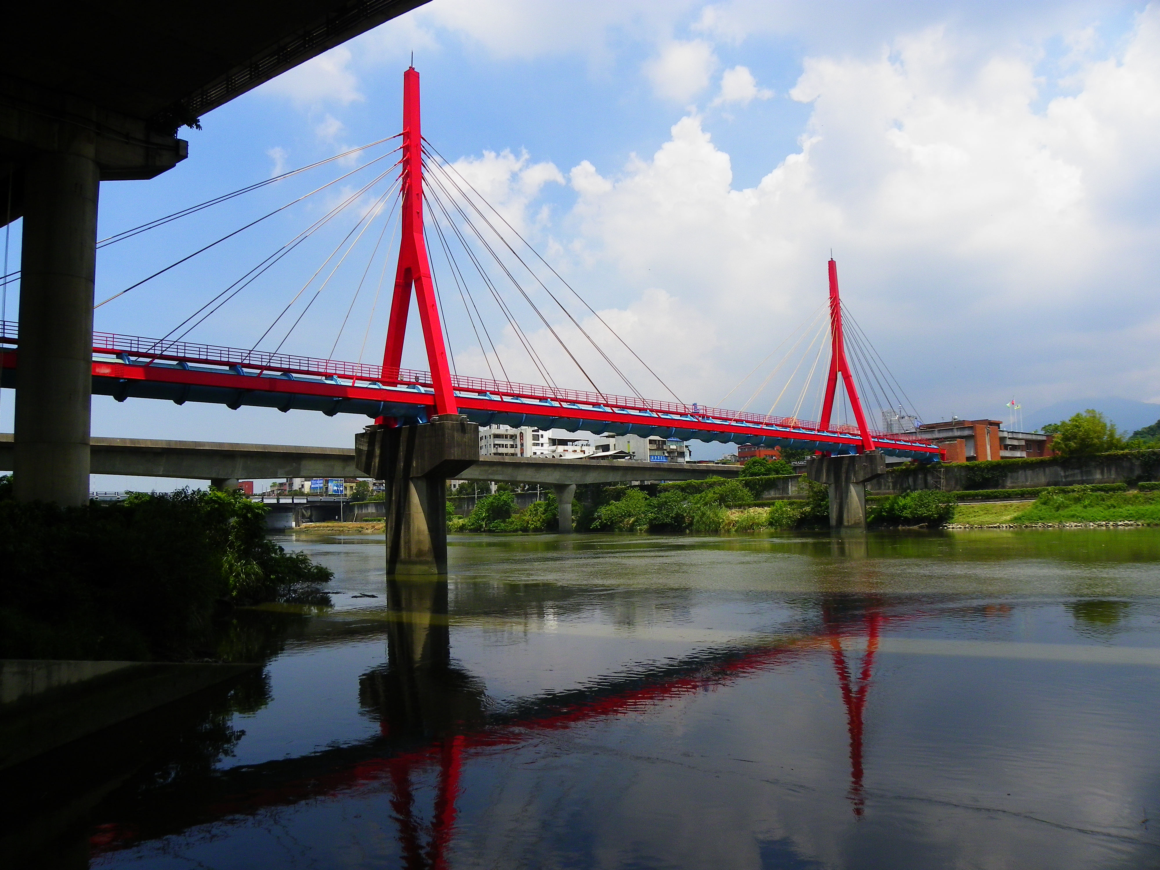 臺北市中山區劍潭青年活動附近，跨基隆河的橋樑群。由前而後分別是：臺北市自來水事業處的水管橋、臺北捷運淡水線、承德路的承德橋。攝影於臺北市兒童育樂中心外，中山高速公路高架橋下的基隆河南岸碼頭前。